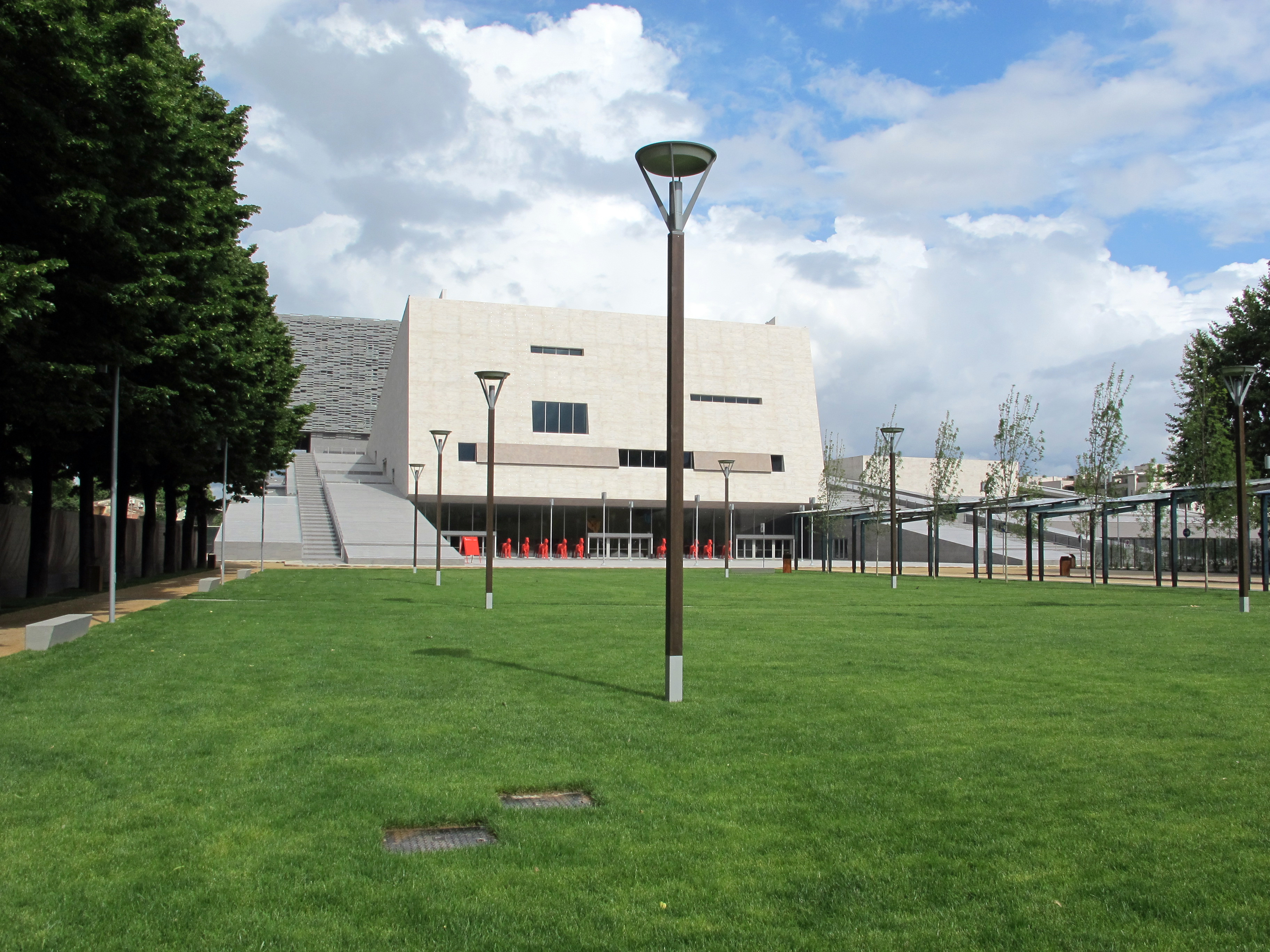 Firenze, miscellanea